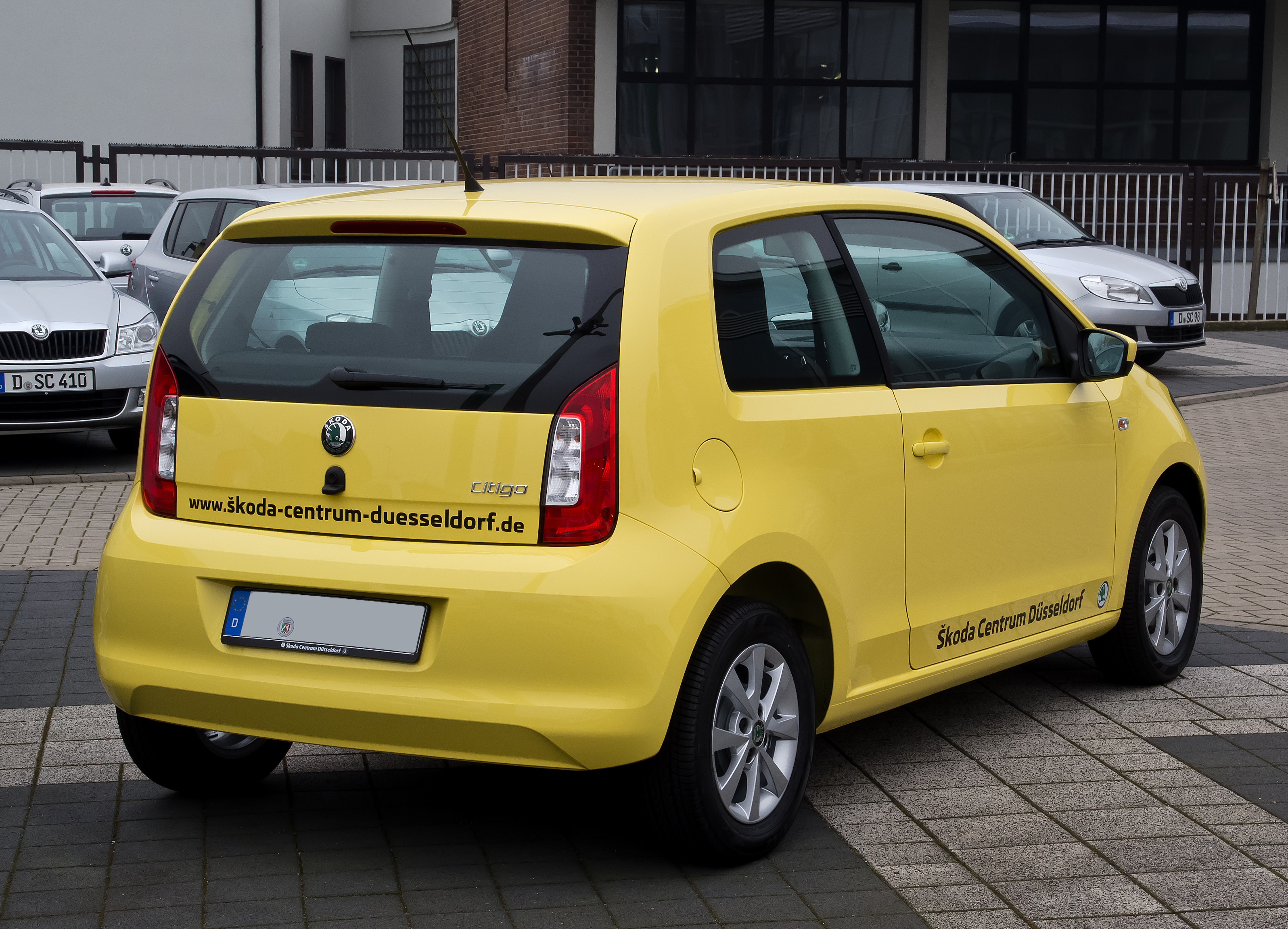 Skoda Citigo 1.0 Ambition